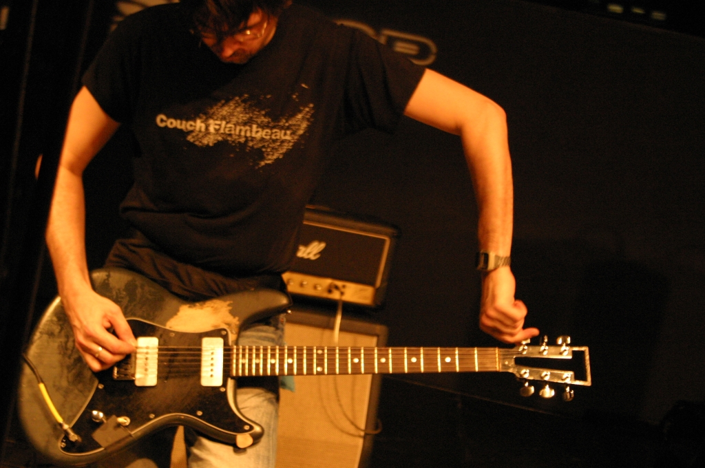 Steve Albini en concert avec Shellac